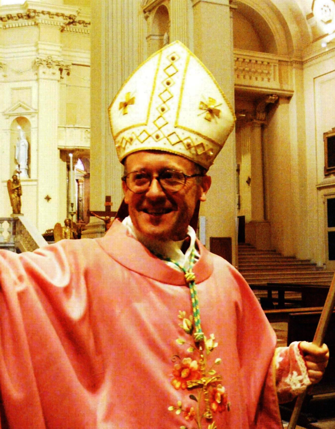 foto dell'ingresso